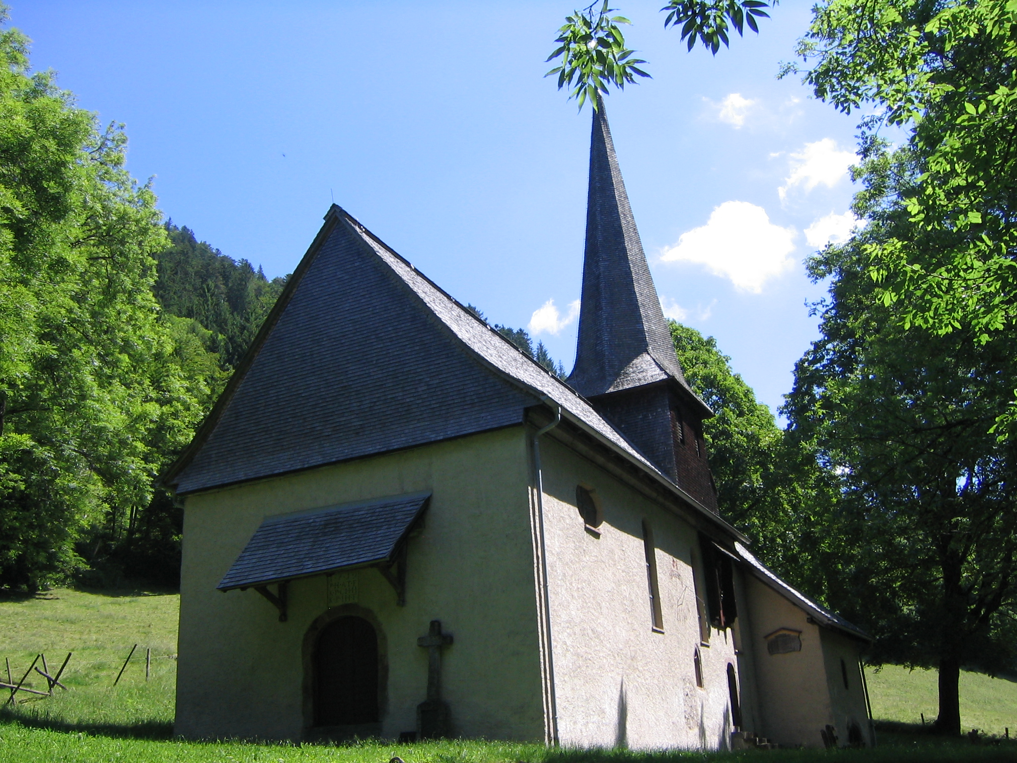 Die Kapelle Sankt Oswald im Höllental gehört politisch zu Breitnau, kirchlich aber zu HInterzarten